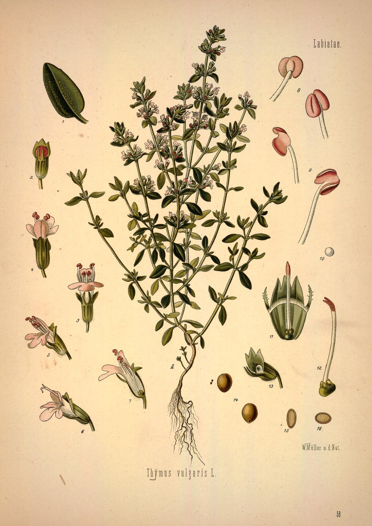 Echter Thymian. A blühende Pflanze, natürl. Grösse; 1 Blatt, vergrössert; 2 Kelch, desgl.; 3, 4, 5 Blüthe von verschiedenen Seiten, desgl.; 6 weibliche Blüthe, desgl.; 7 Zwitterblüthe im Längsschnitt, desgl.; 8 Staubgefässe von verschiedenen Seiten, desgl.; 9 dieselben geöffnet, desgl.; 10 Pollen, desgl.; 11 Stempel mit zerschnittenem Kelche, desgl.; 12 Stempel, desgl.; 13 Frucht, desgl.; 14 Same, natürl. Grösse und vergrössert; 15 u. 16 derselbe zerschnitten.